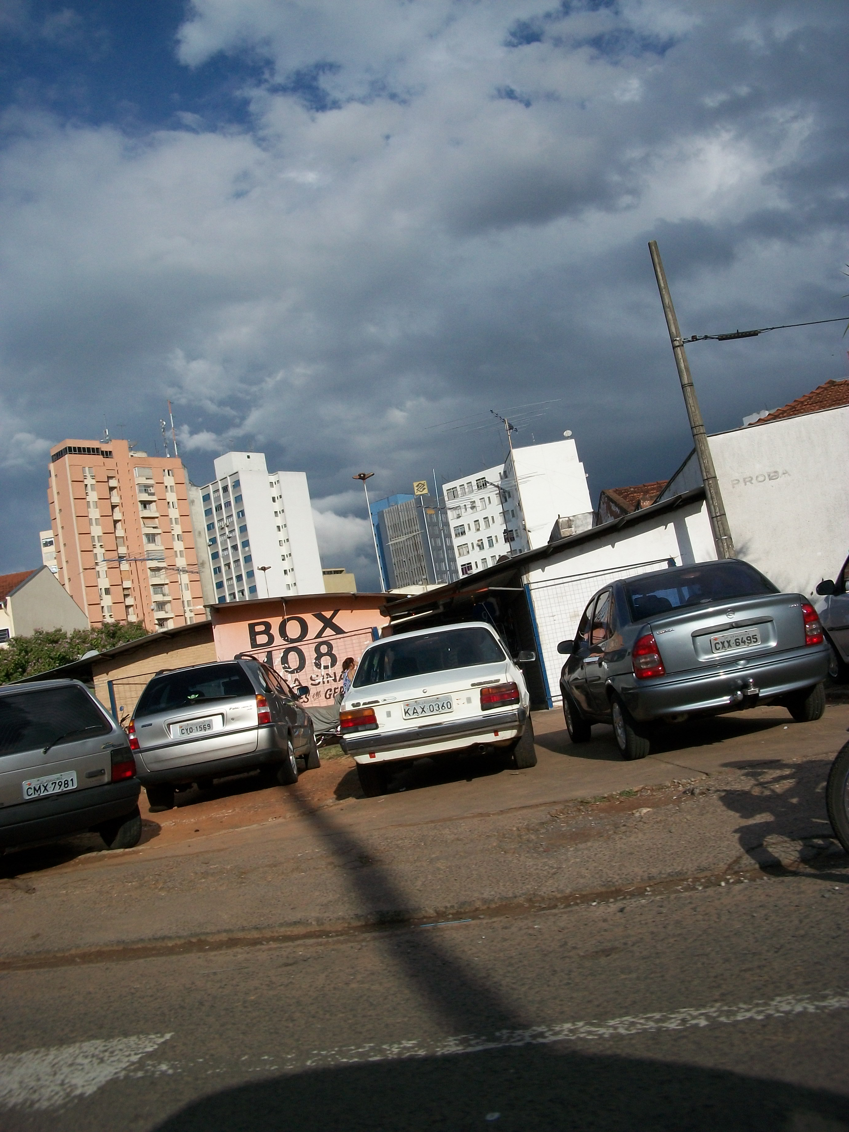 Camelódromo municipal de Araçatuba, face voltada à Av.dos Araçás, mostrando o estacionamento e algumas boxes. Ao fundo é possível visualizar o prédio do Banco do Brasil.